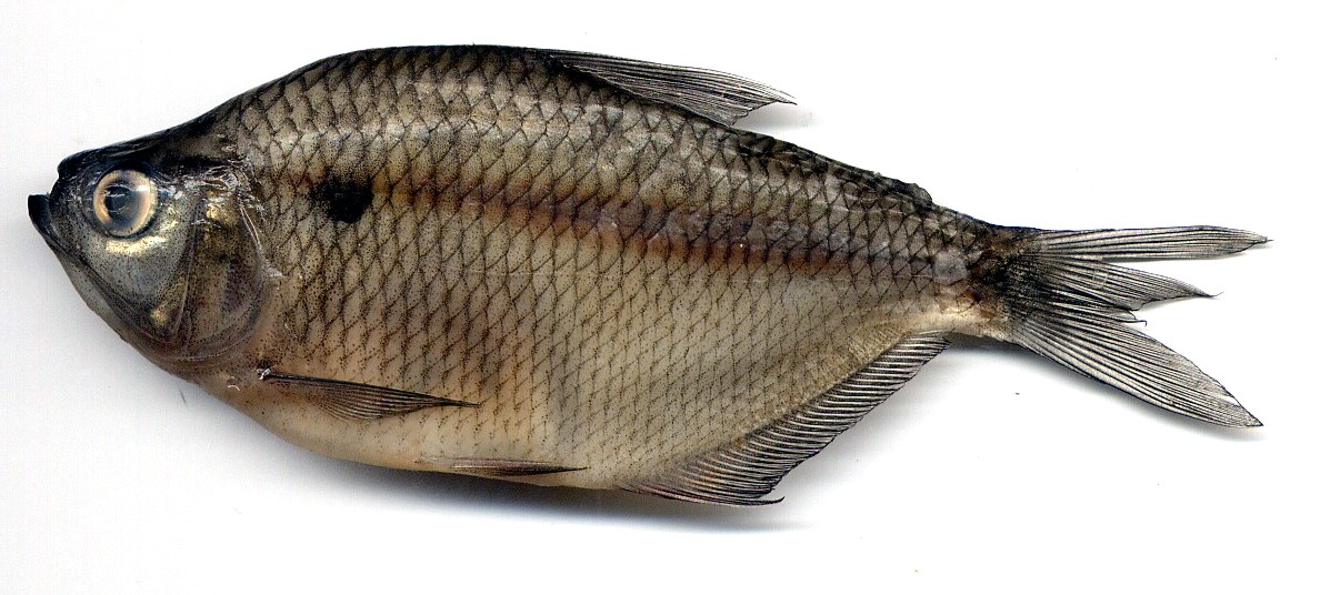 Astyanax magdalenae